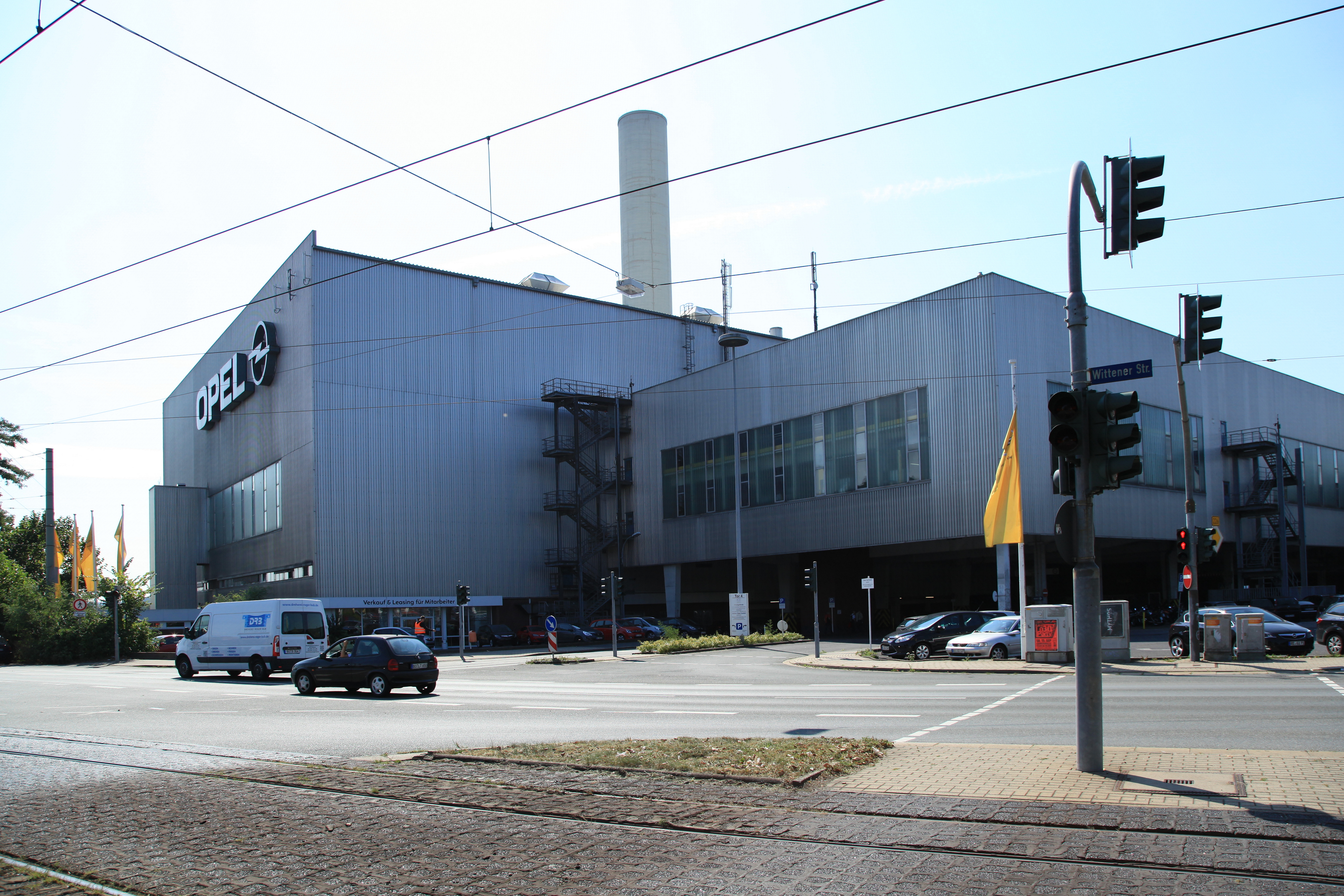 Opel Werk 1 hinter der Wittener Straße in Bochum